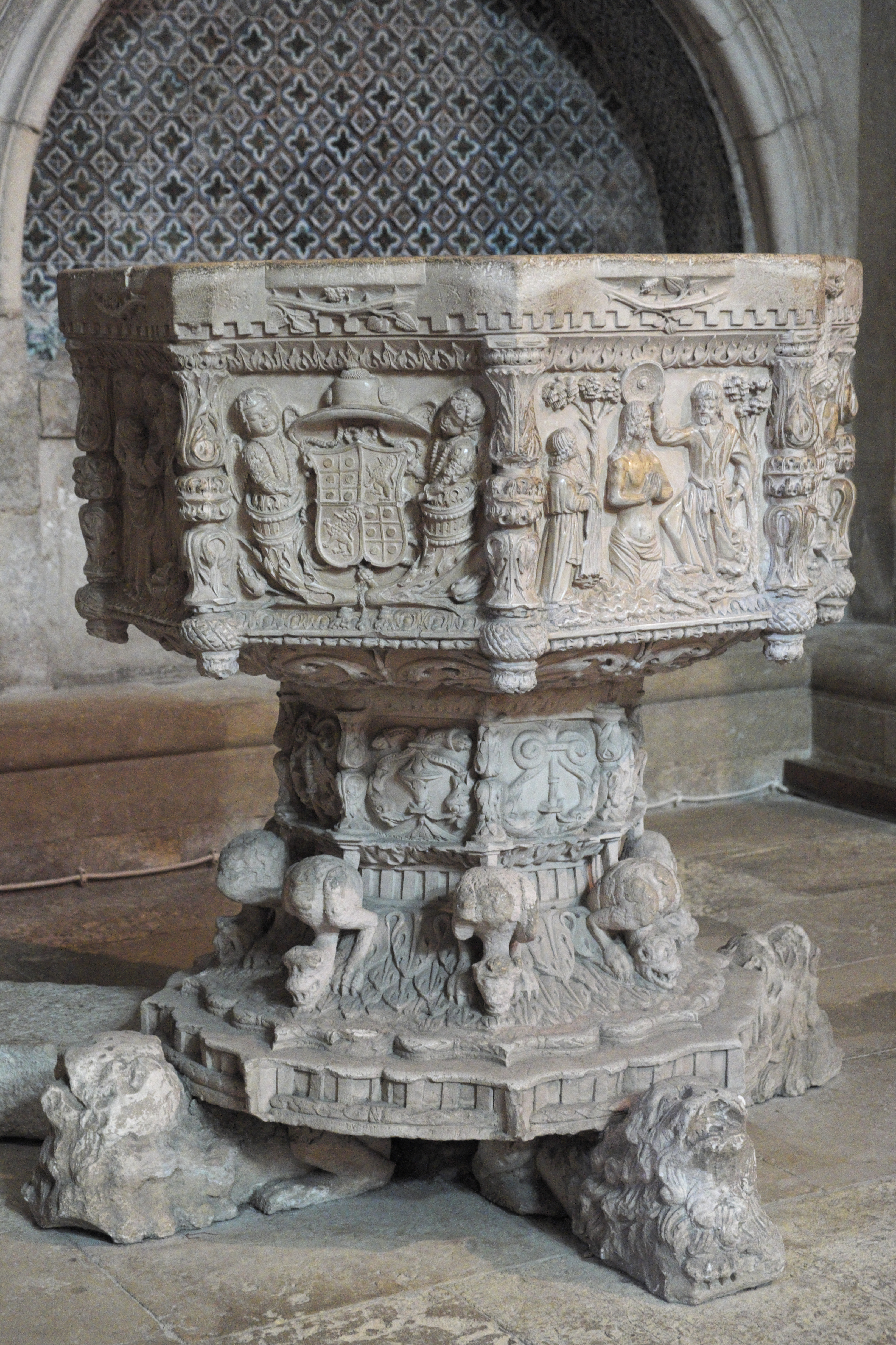 Manuelinisches Taufbecken in der alten Kathedrale Sé Velha in Coimbra in Portugal